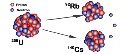 Fisión del núcleo de uranio-235